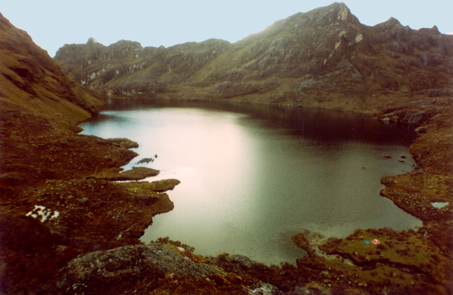 Laguna del Santo Cristo. Parque Nacional Sierra Nevada. Estado Mérida, Venezuela.